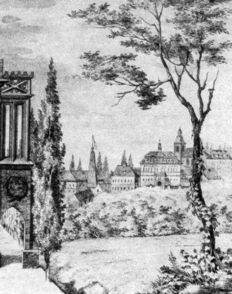 Rytina se zdibským zámkem a kostelem, detail. Dle kresby F. A. Hebera, cca 1840.